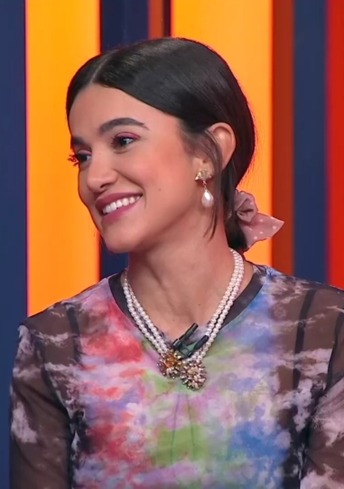 Manu Gavassi em 2020